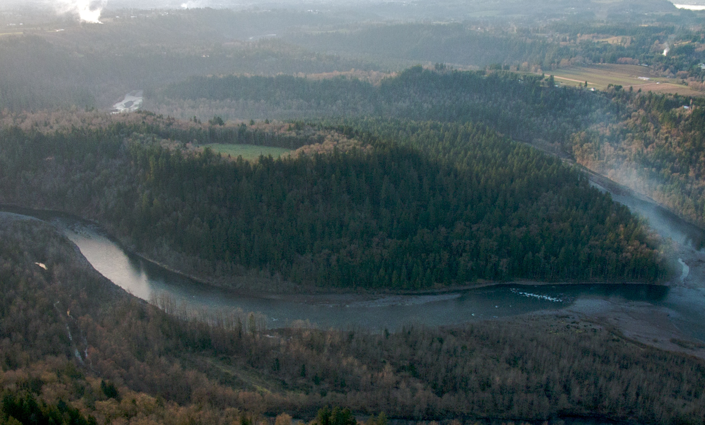 Oxbow Park, Oregon